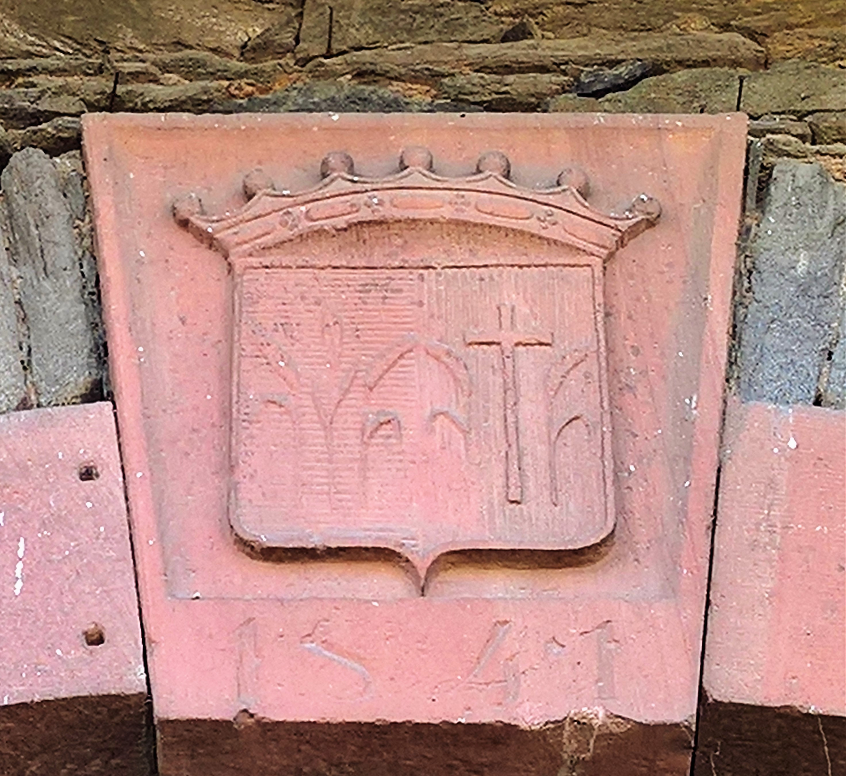 Wappen über dem Eingangstor des Vierseitenhofes Hauenstein